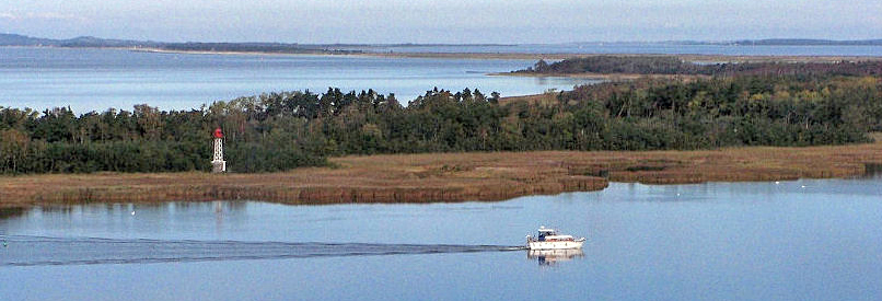 Nationalpark Vorpommersche Boddenlandschaft, Blick von Barhöft über den Bock nach Hiddensee